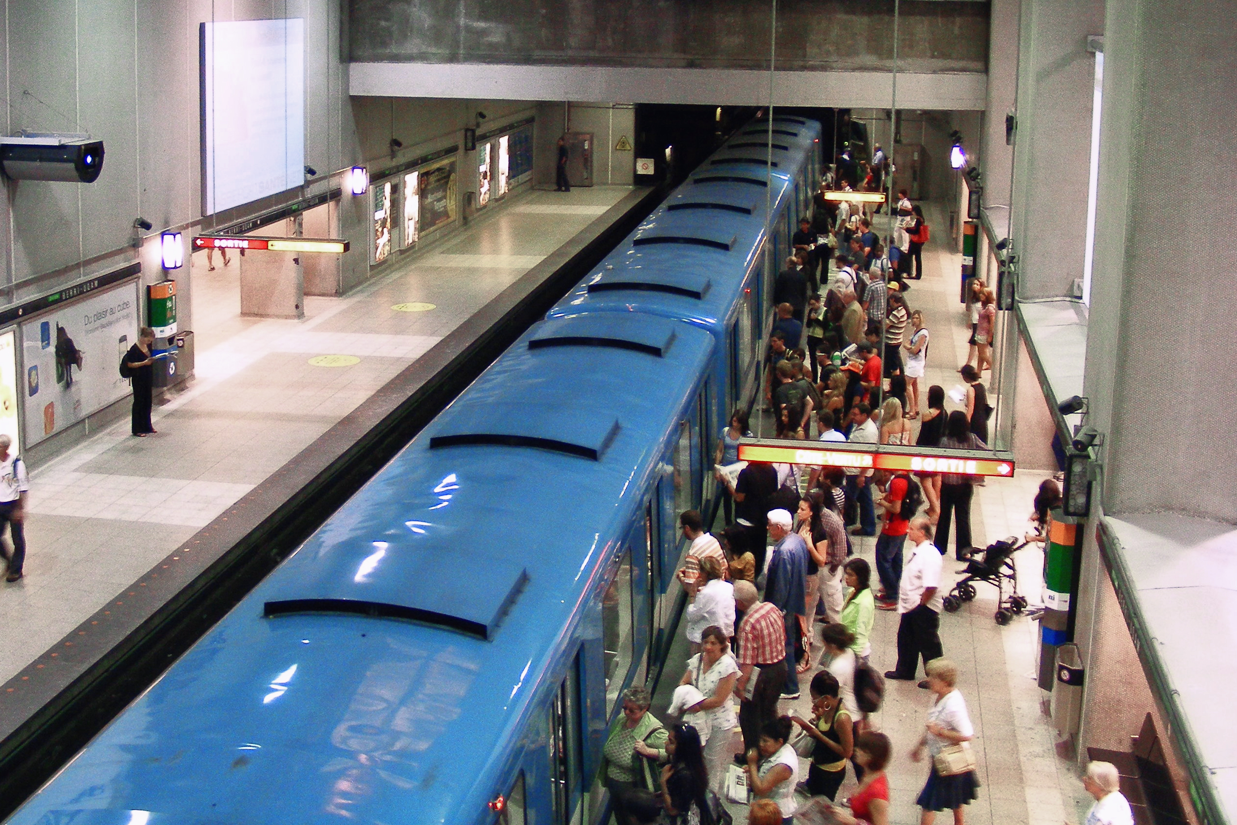 Berri-UQAM Metro station